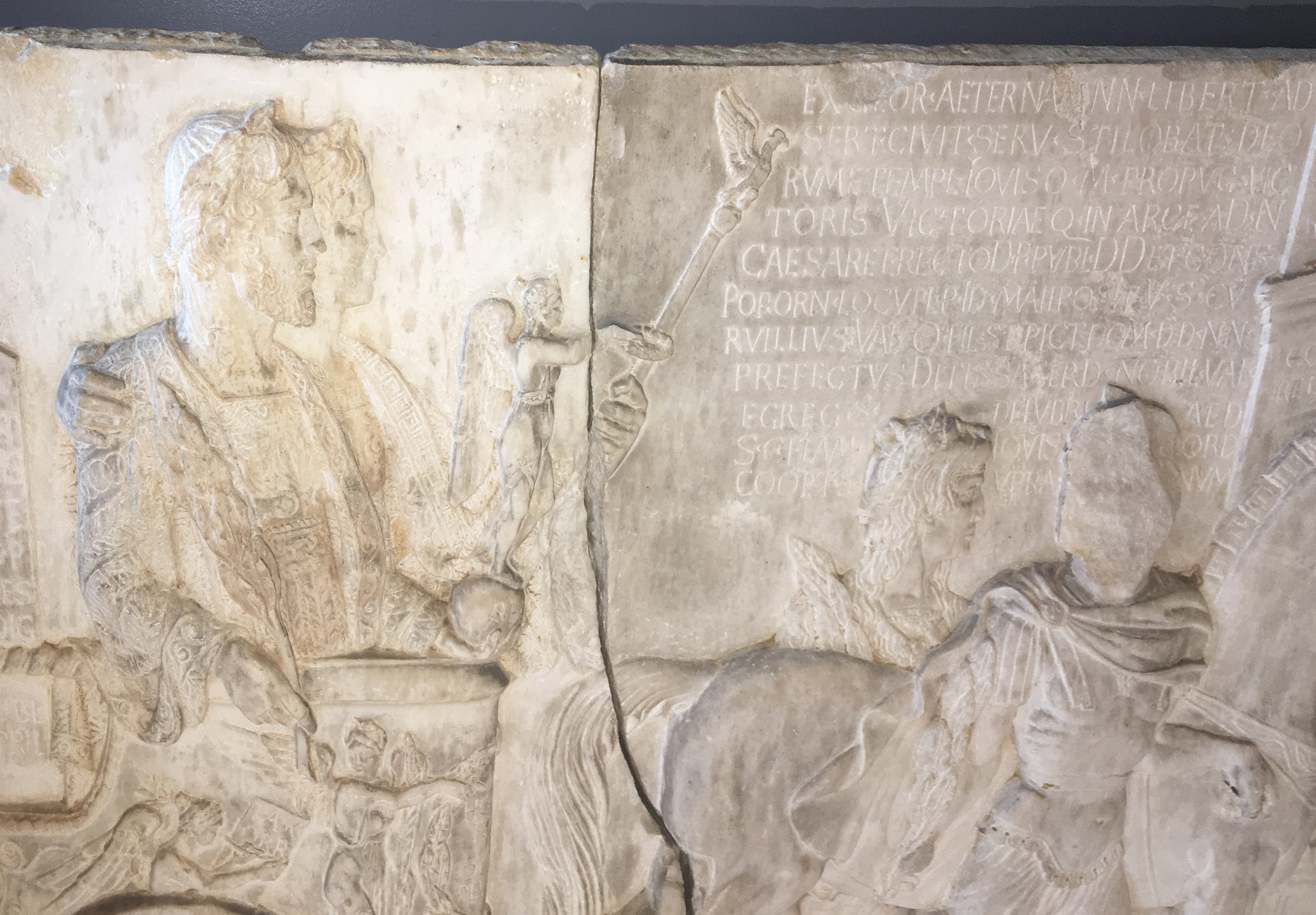 Bas-relief des Tetricus "trouvé" en fouilles à Nérac par le sculpteur-faussaire Maximilien Théodore Chrétin. Le "faux de Nérac".